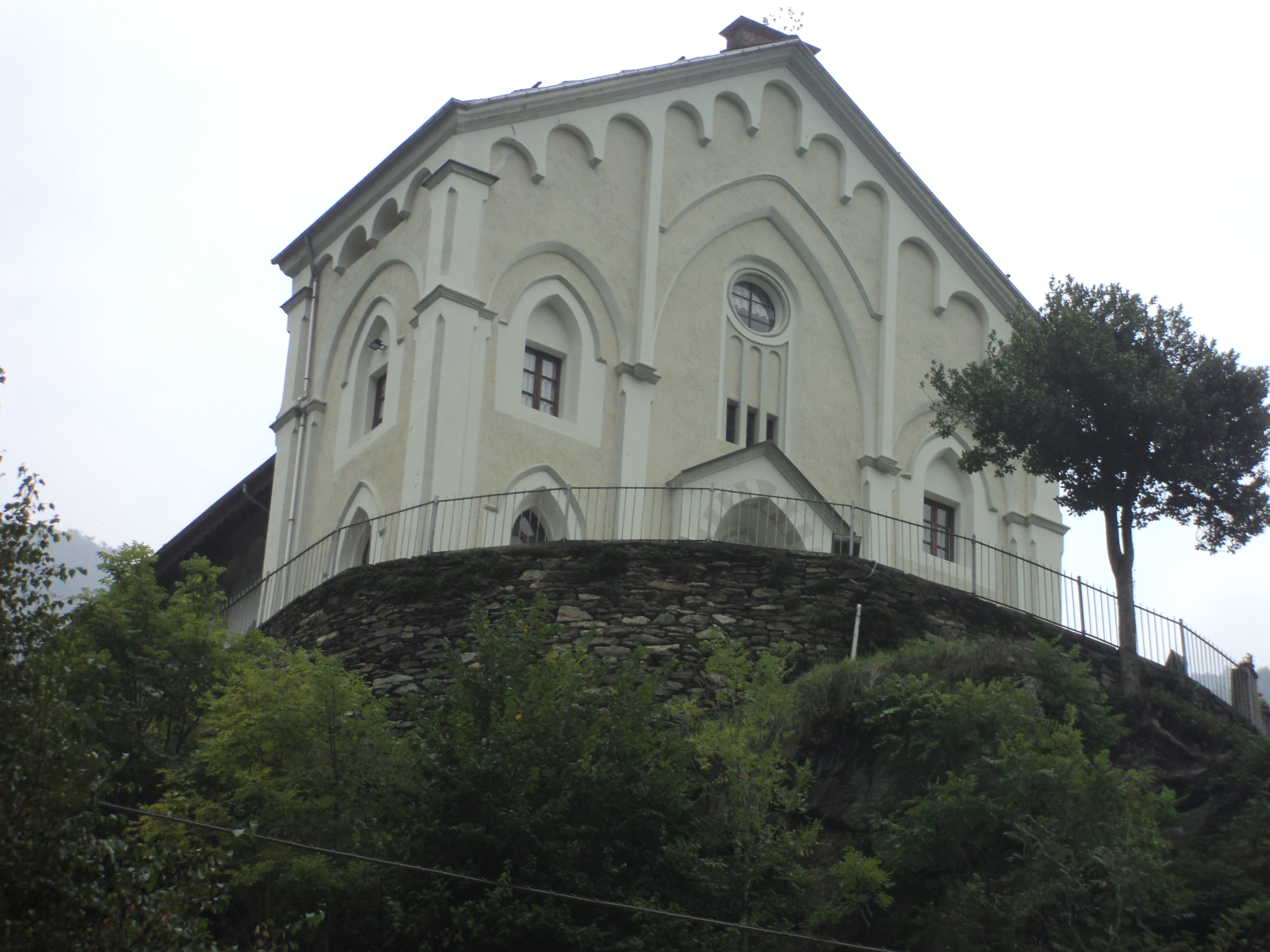 Angrogna (TO): il tempio valdese in frazione Pradeltorno